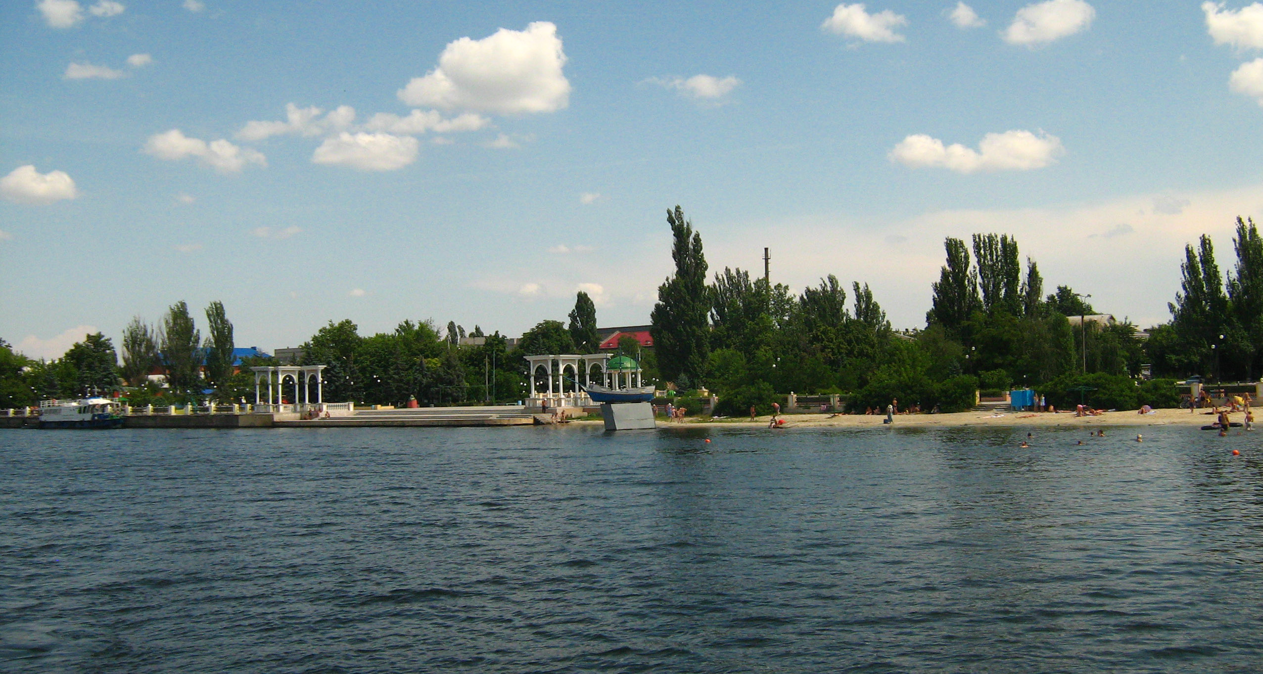 Hola Pristaņas krastmala no Čaikas upes